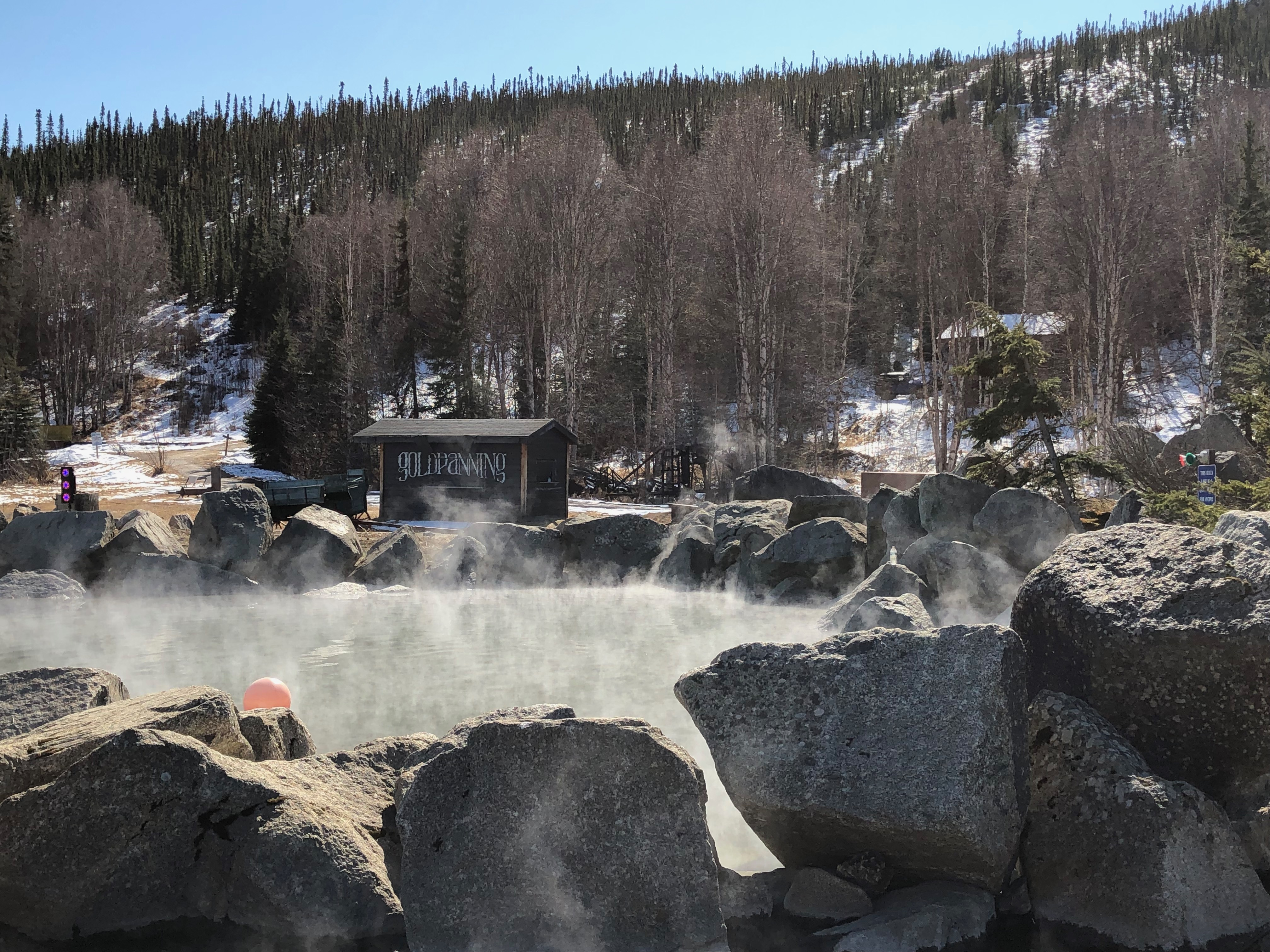 Chena Hot Springs